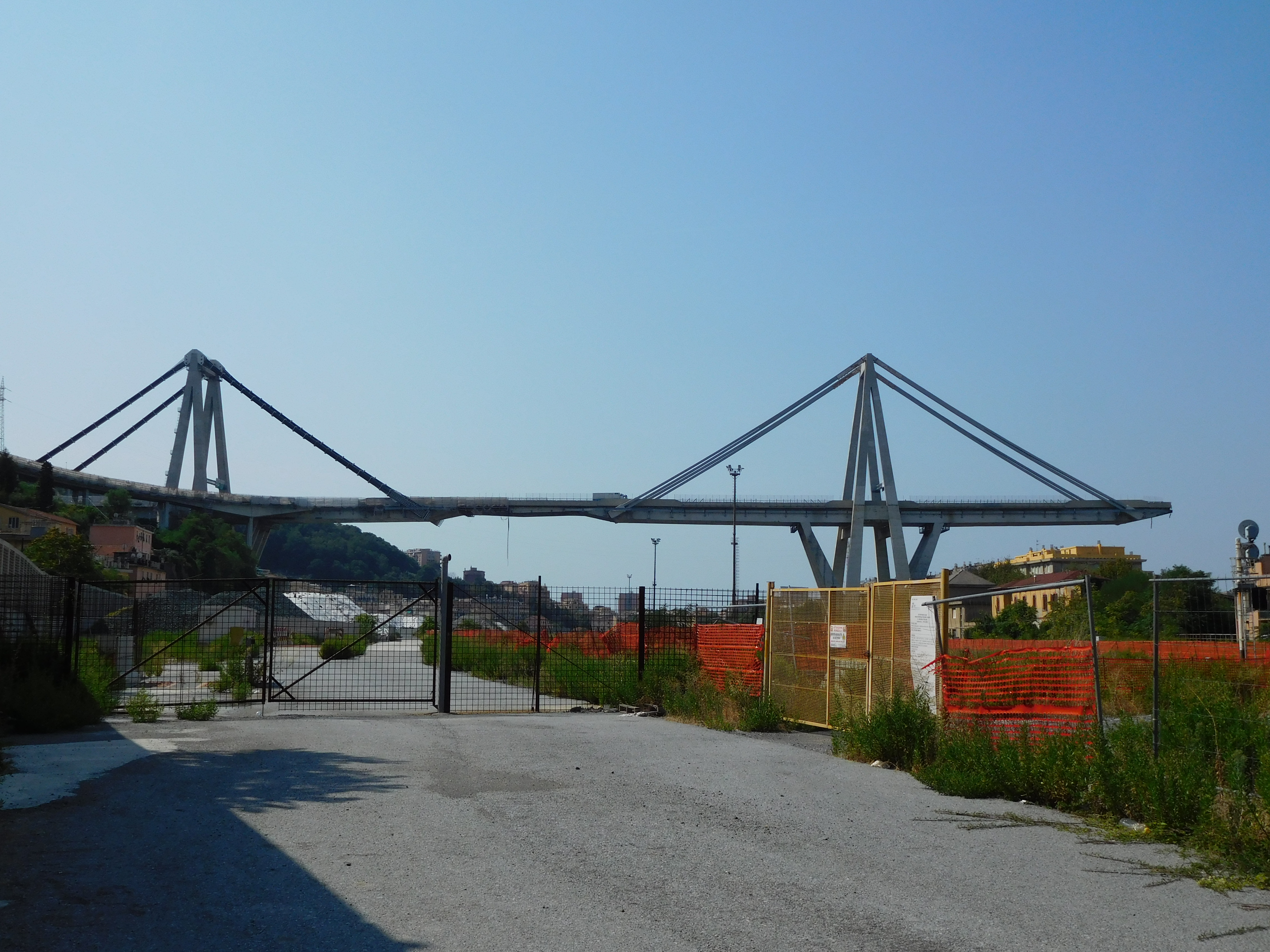 Viadotto Polcevera after collapse